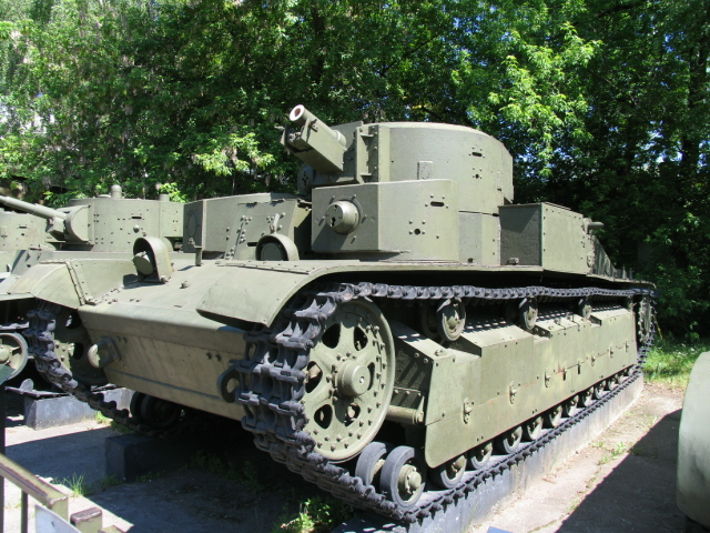 Т-28 в Центральном музее Вооружённых Сил в Москве